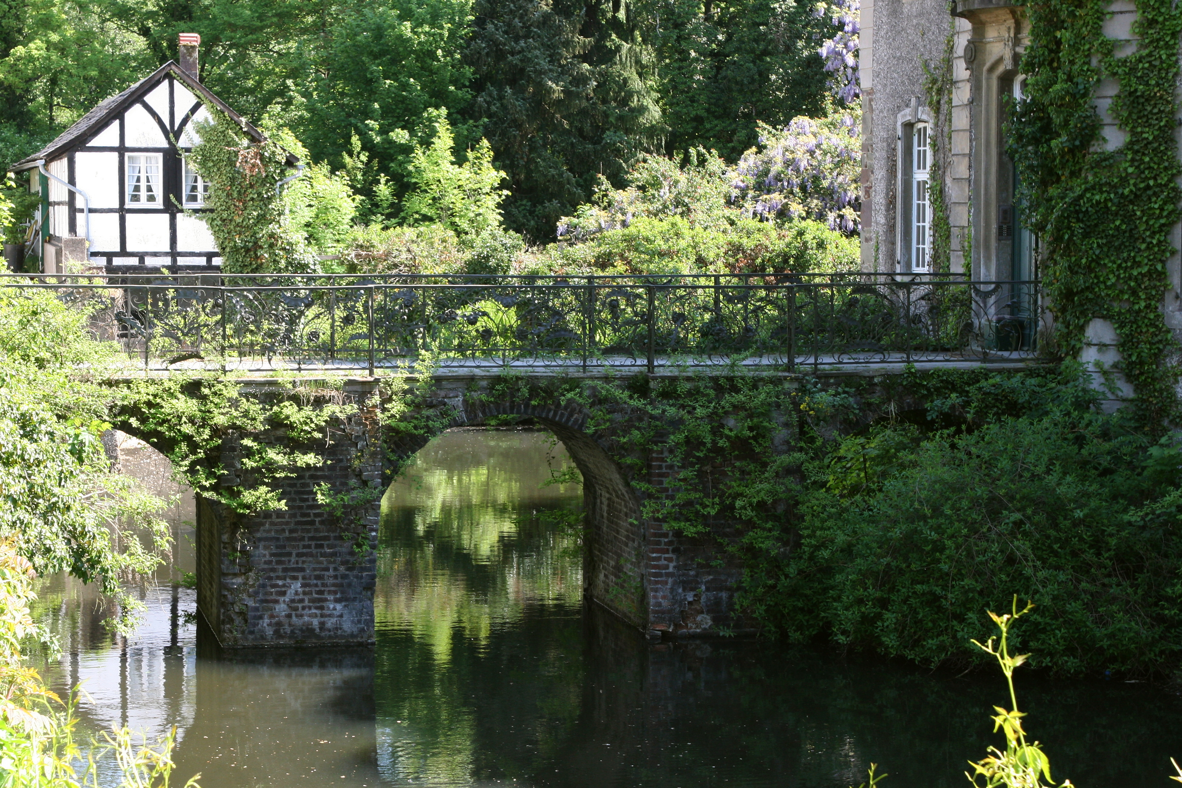 Schloss Hackhausen in Solingen